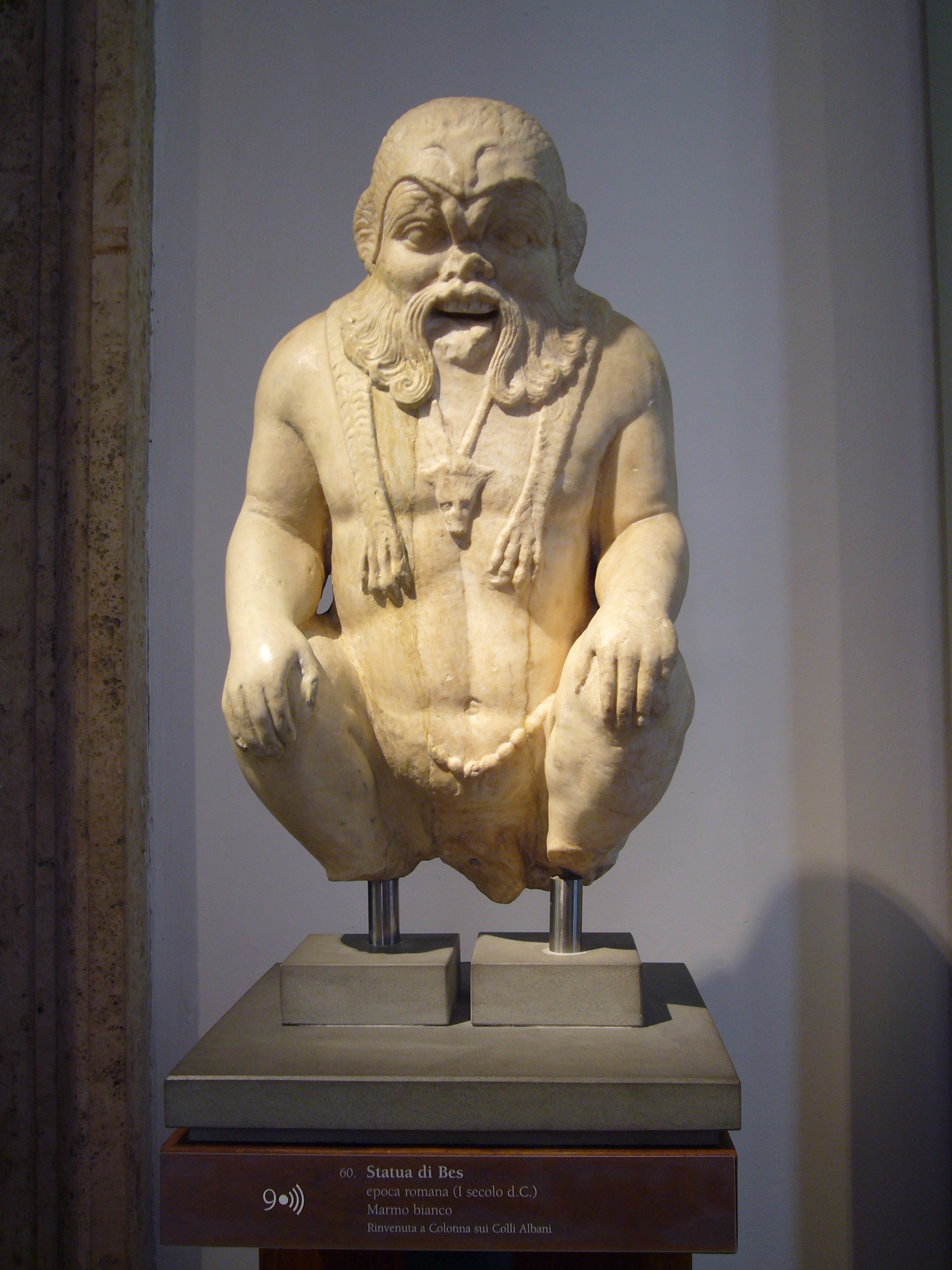 Roma, Museo Barracco: statua romana del dio egizio Bes, del primo secolo d.C., proveniente da una villa romana sui Colli Albani in comune di Colonna.